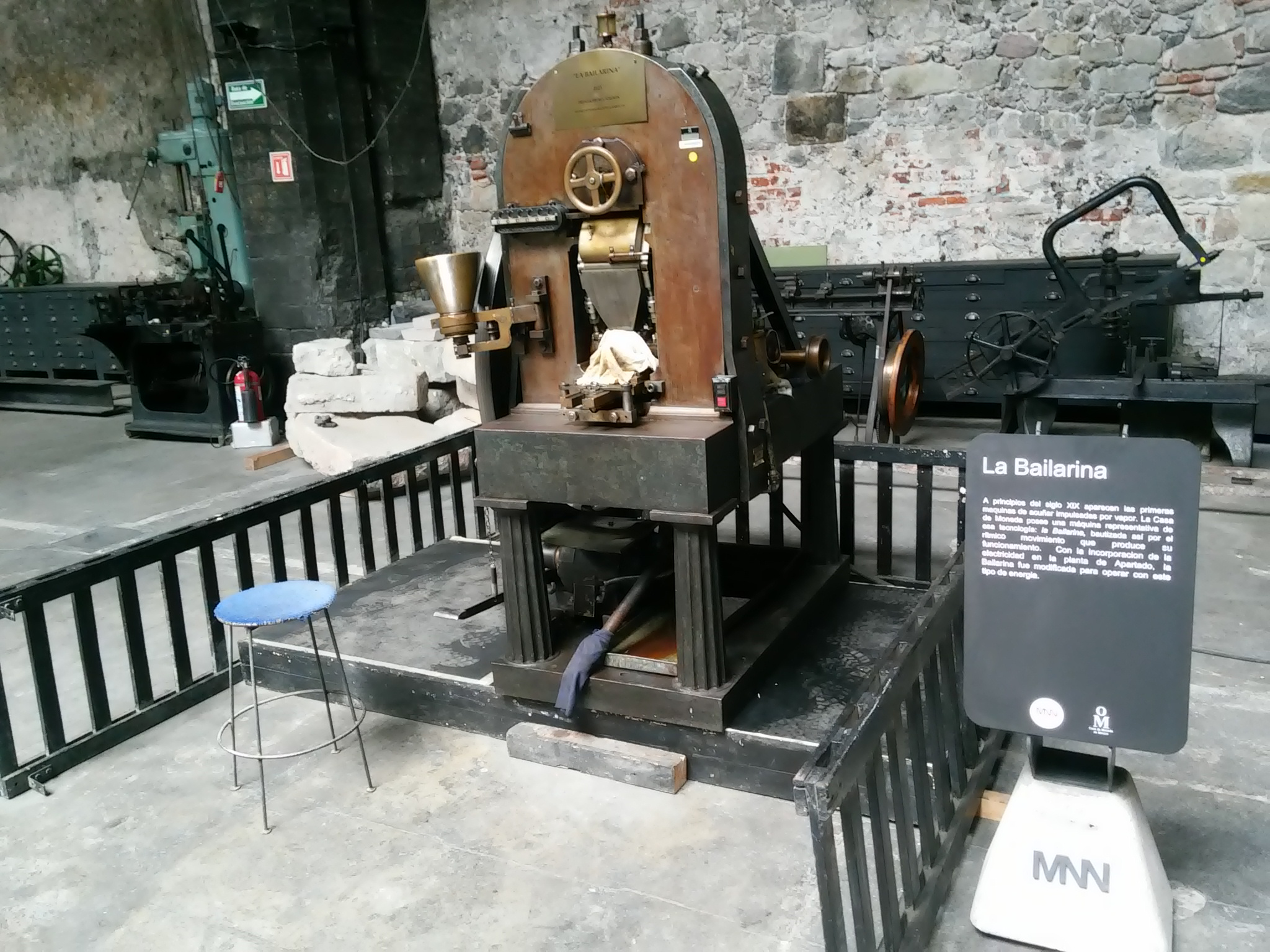 Prensa de Acuñación fabricada en 1832 conocida como “La Bailarina” en el museo numismático nacional en la Ciudad de México